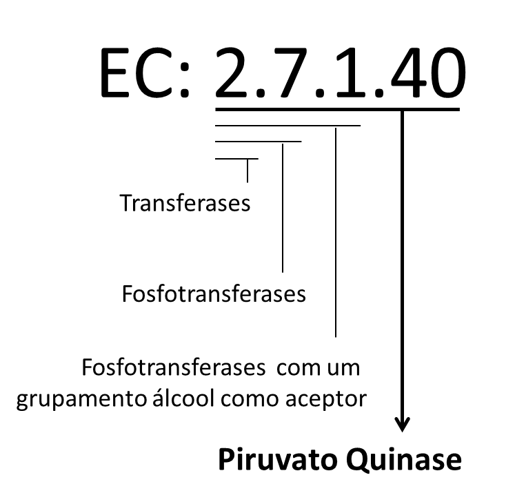 EC PK